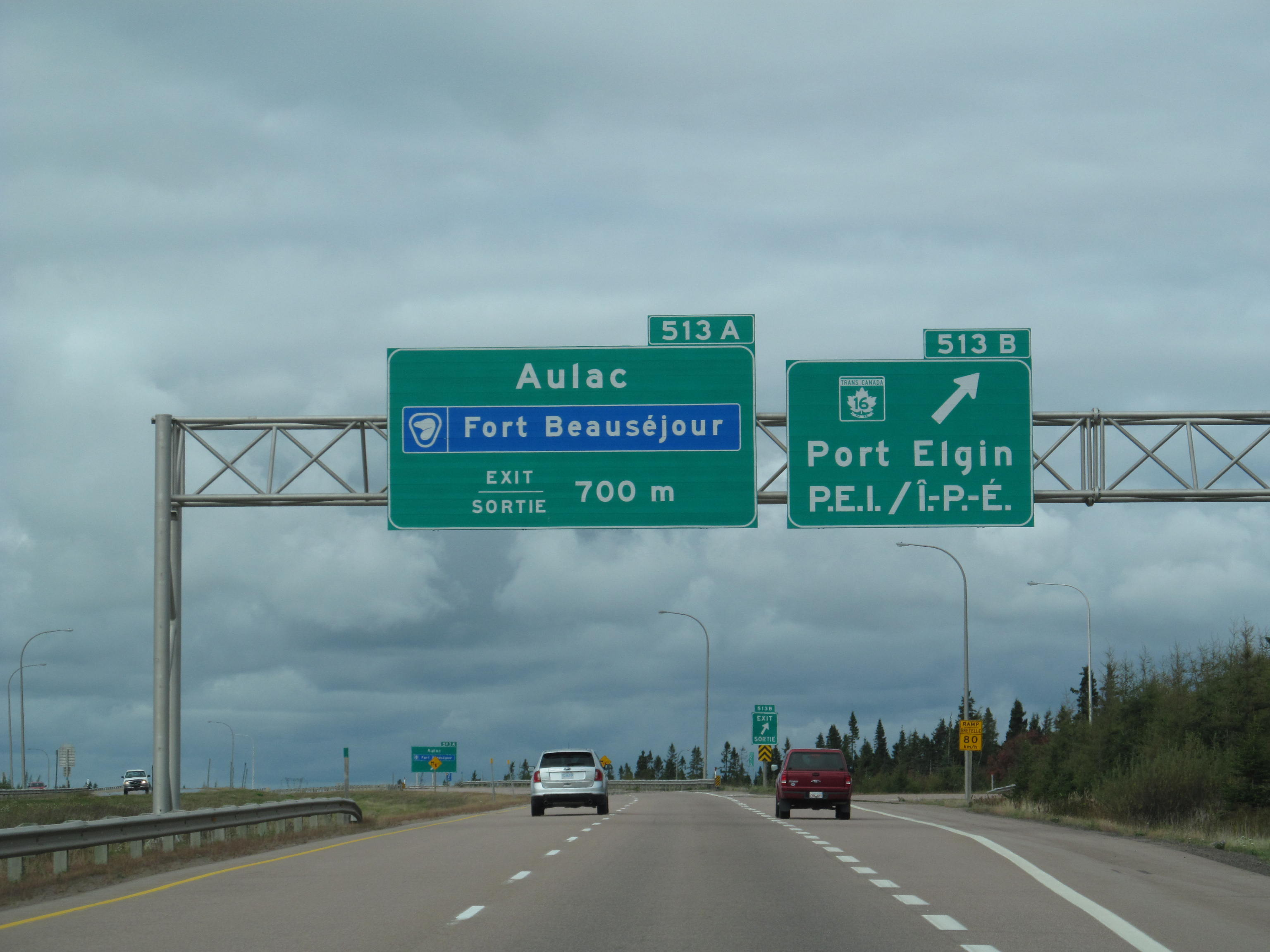 Panneau autoroutier, au Nouveau-brunswick, indiquant la direction du Fort Beauséjour, Aulac, Port Elgin et l'île du Prince-Edouard.